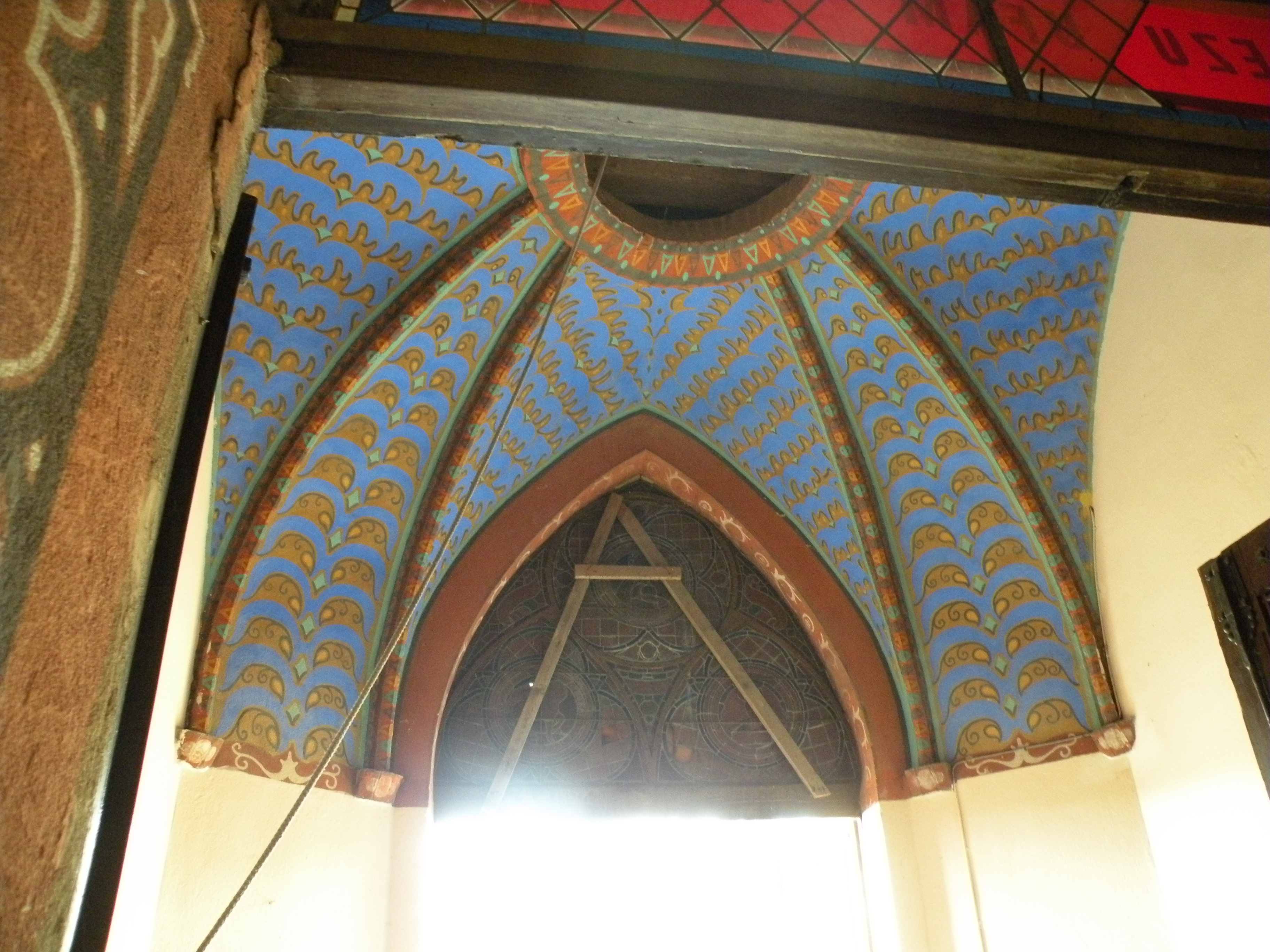 Brąswałd